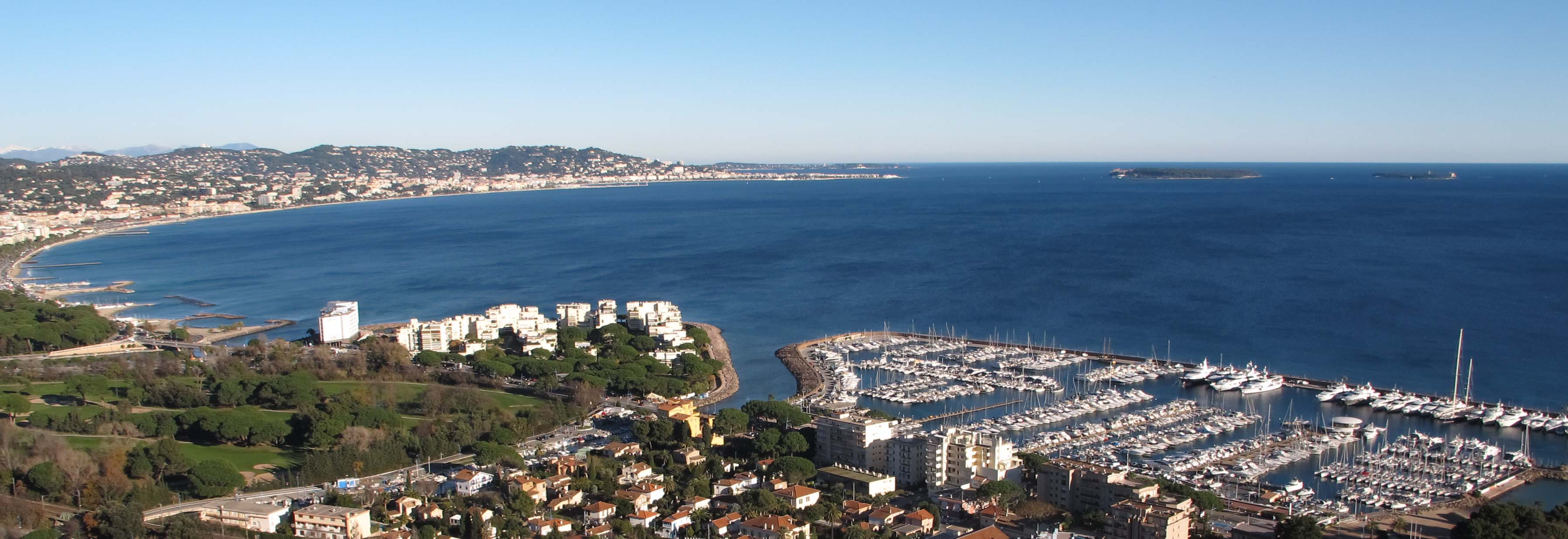 Vue sur le golfe de la Napoule du sommet du parc du San Peyre (131 m) à Mandelieu-La-Napoule, près de Cannes, PACA, France.